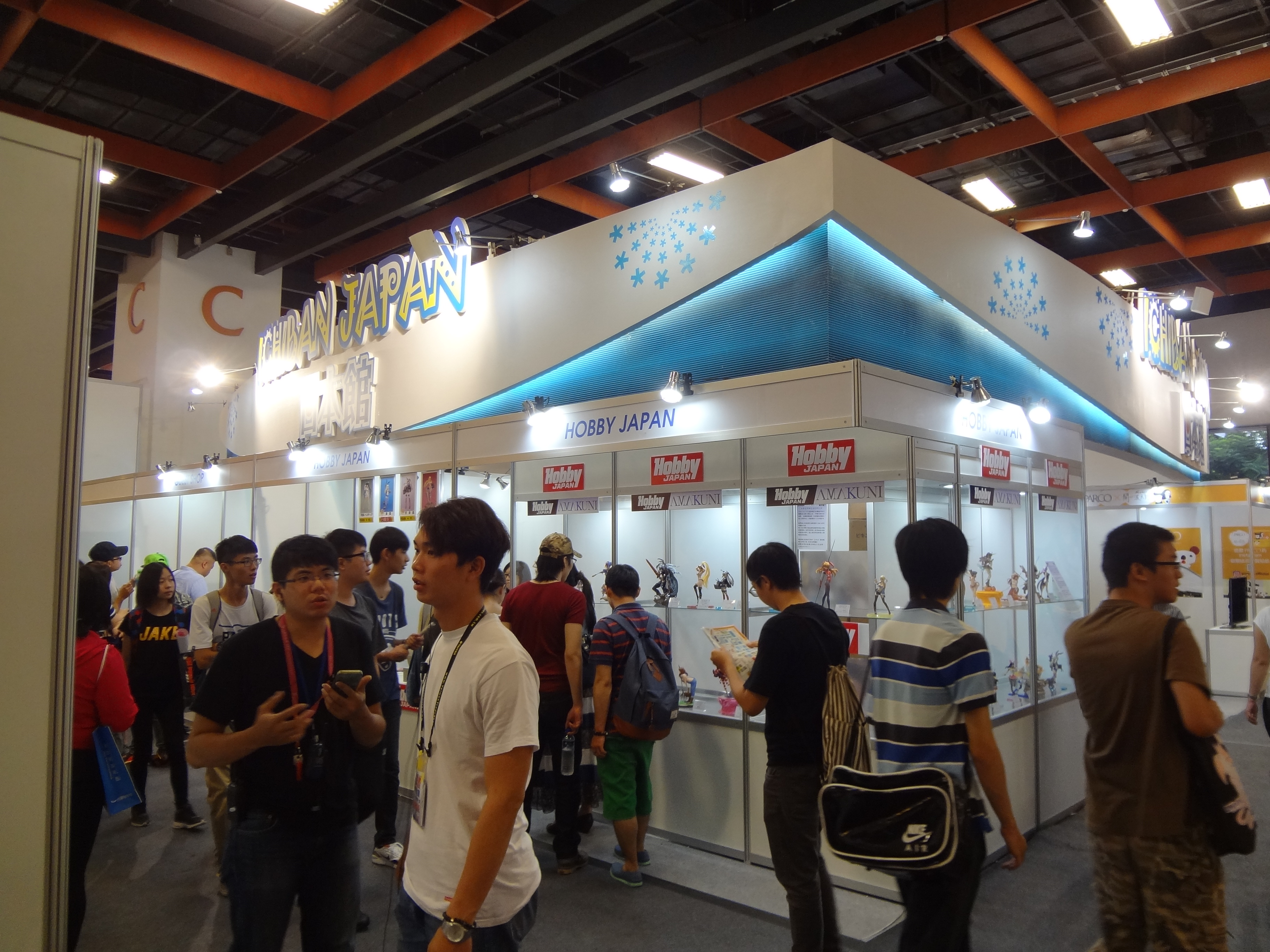 2016年（第17屆）漫畫博覽會日本館。